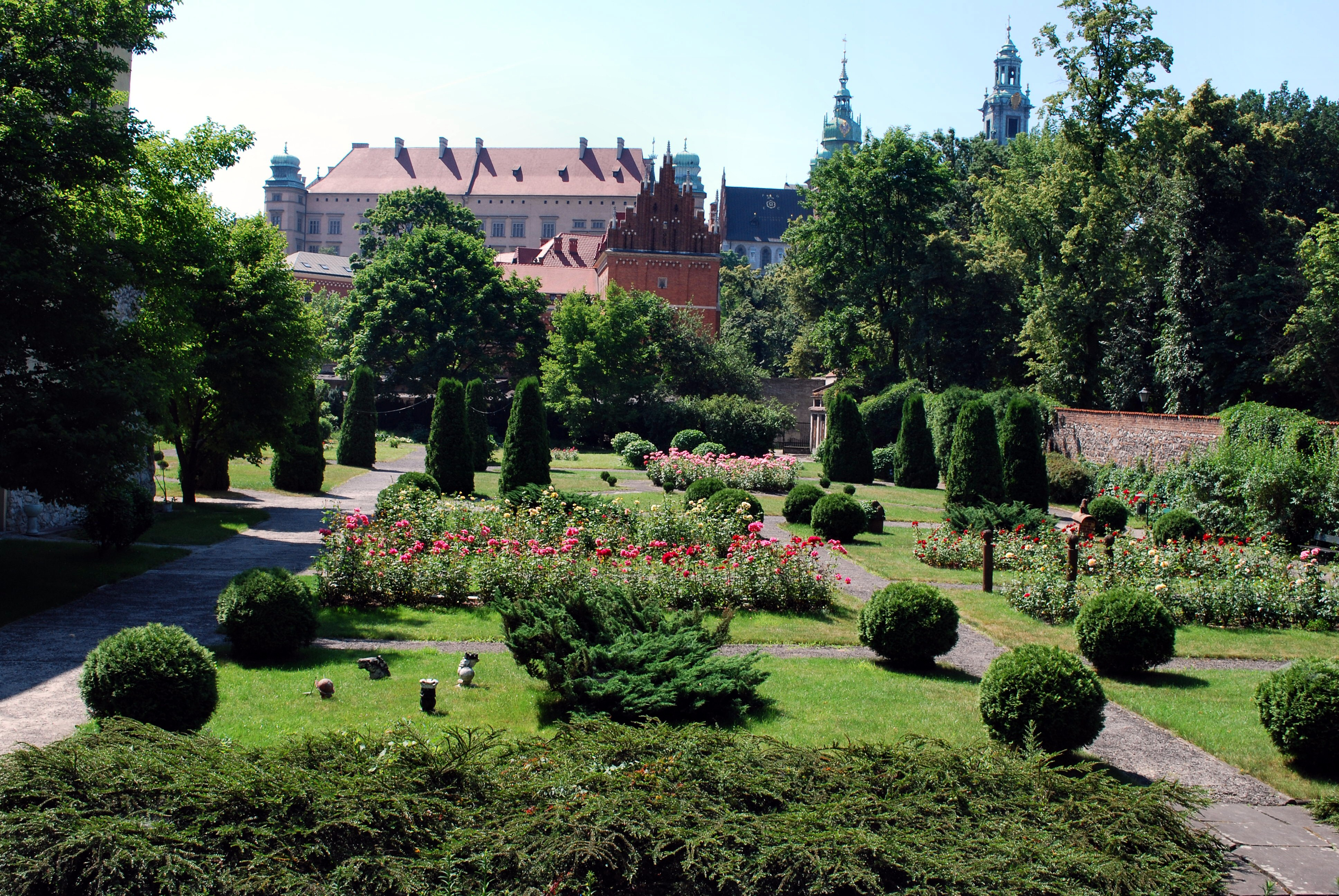 Ogród Muzeum Archeologicznego w Krakowie